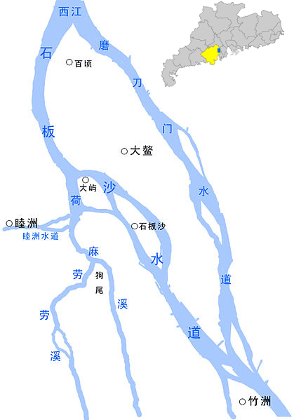 中国广东省江门市新会区境内的石板沙水道及其附近水系图。